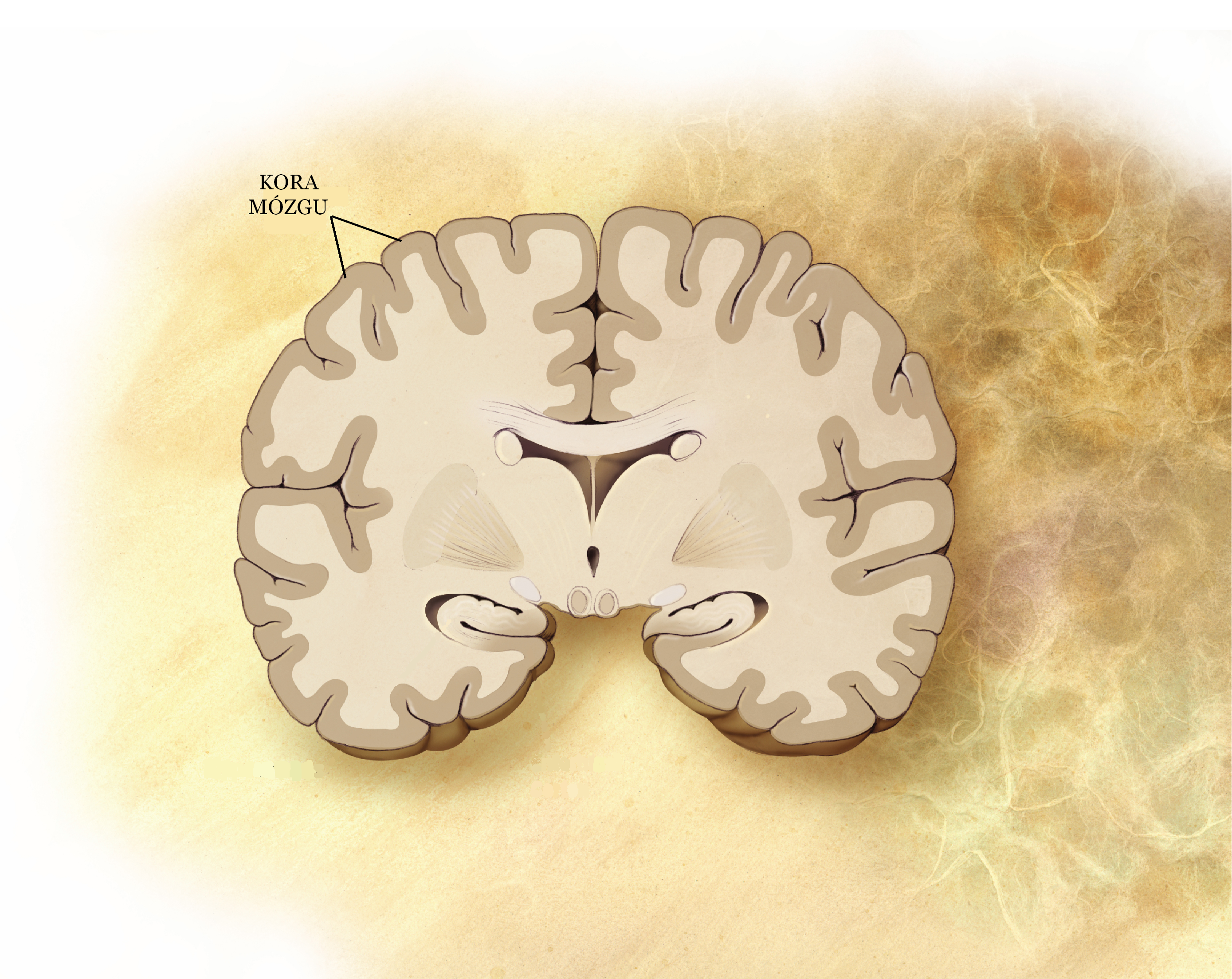 Przekrój koronalny przez ludzki mózg. Zaznaczono korę mózgu.